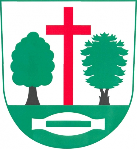 znak, Janov, okres Rychnov nad Kněžnou